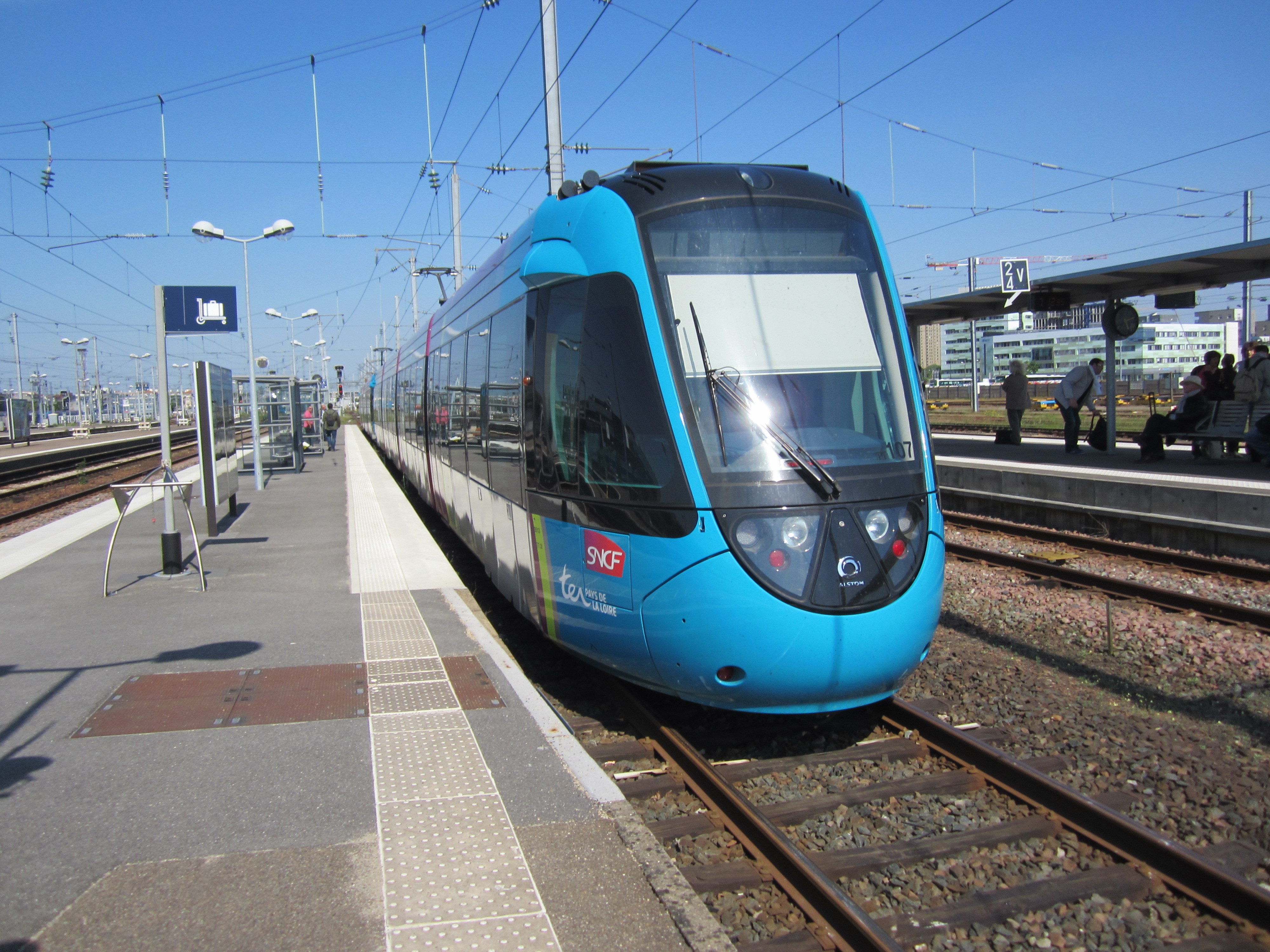 Alstom Dualis n°107 à la gare SNCF de Nantes, en attente du départ sur la ligne Nantes - Vertou.